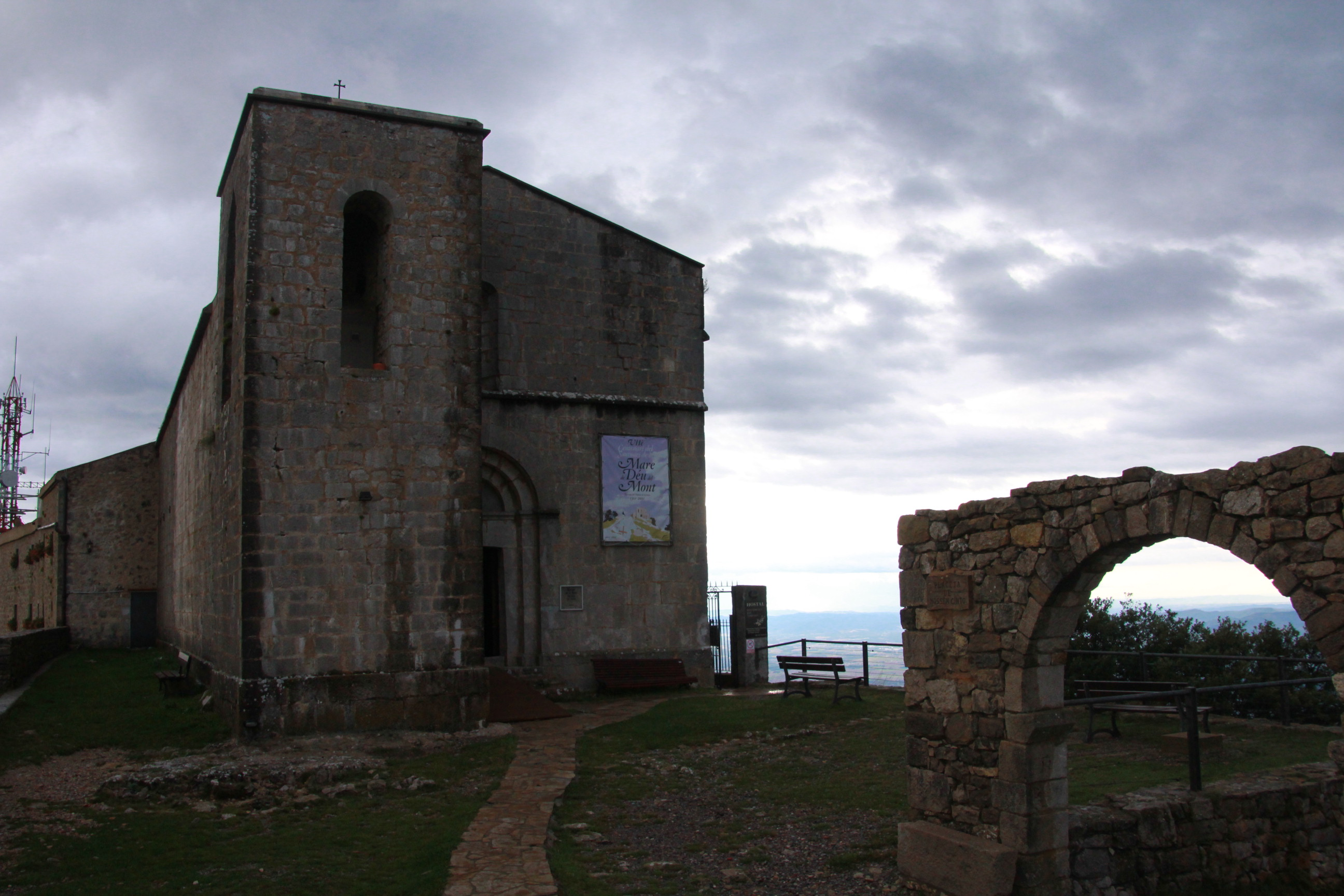 Santuari la Mare de Déu del Mont (Albanyà)